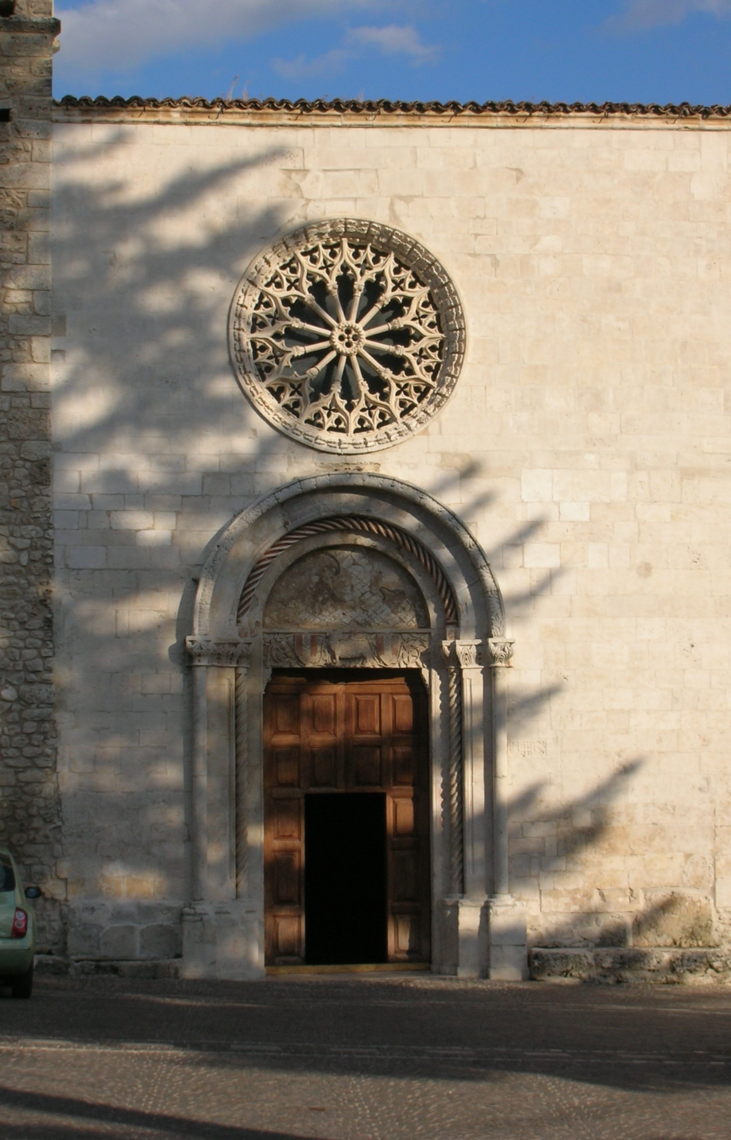 Assergi (credo)